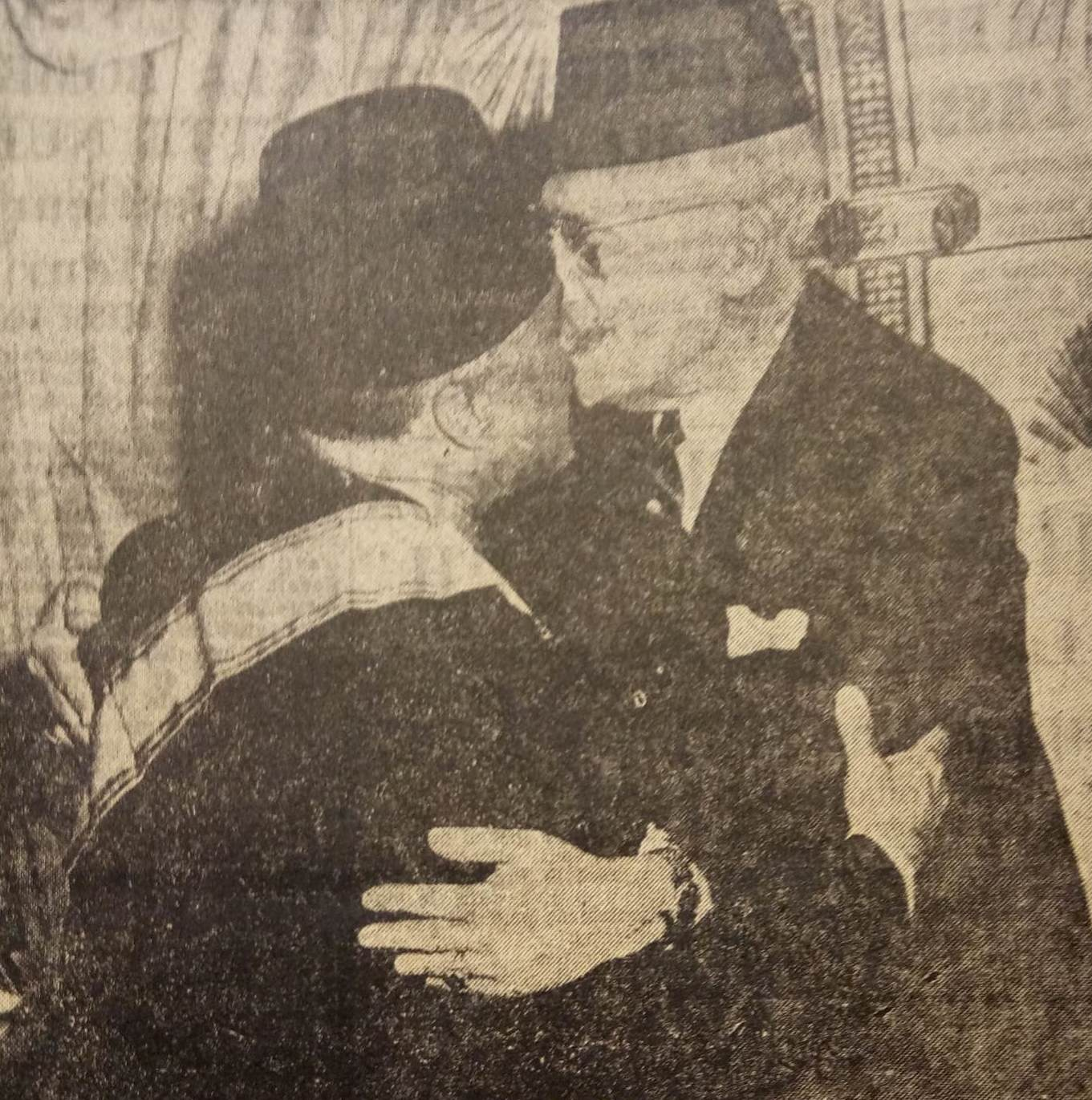 S.A. le Bey donne l'accolade au président Bourguiba après son investiture